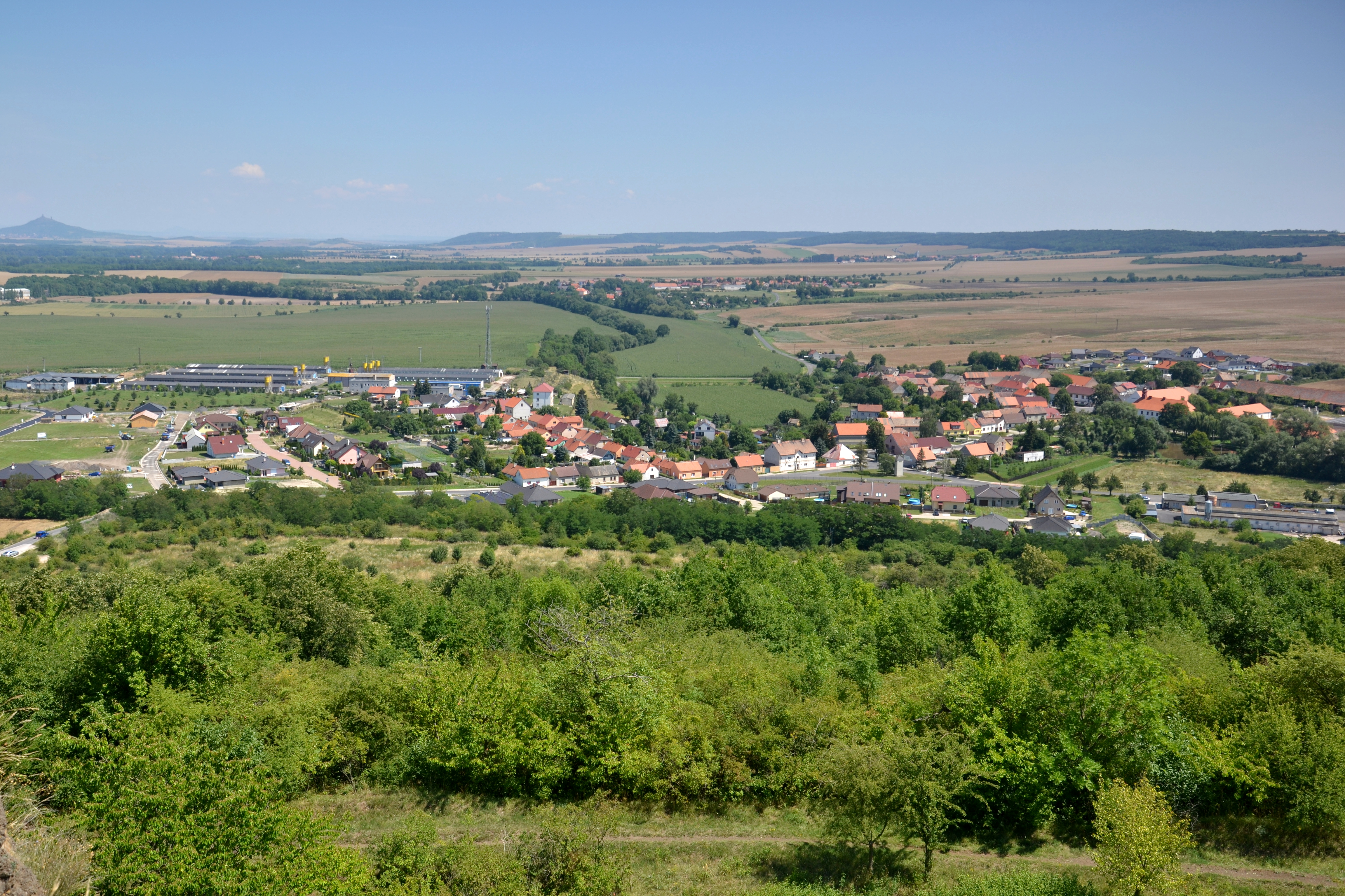 Blšanský chlum – pohled na Blšany u Loun